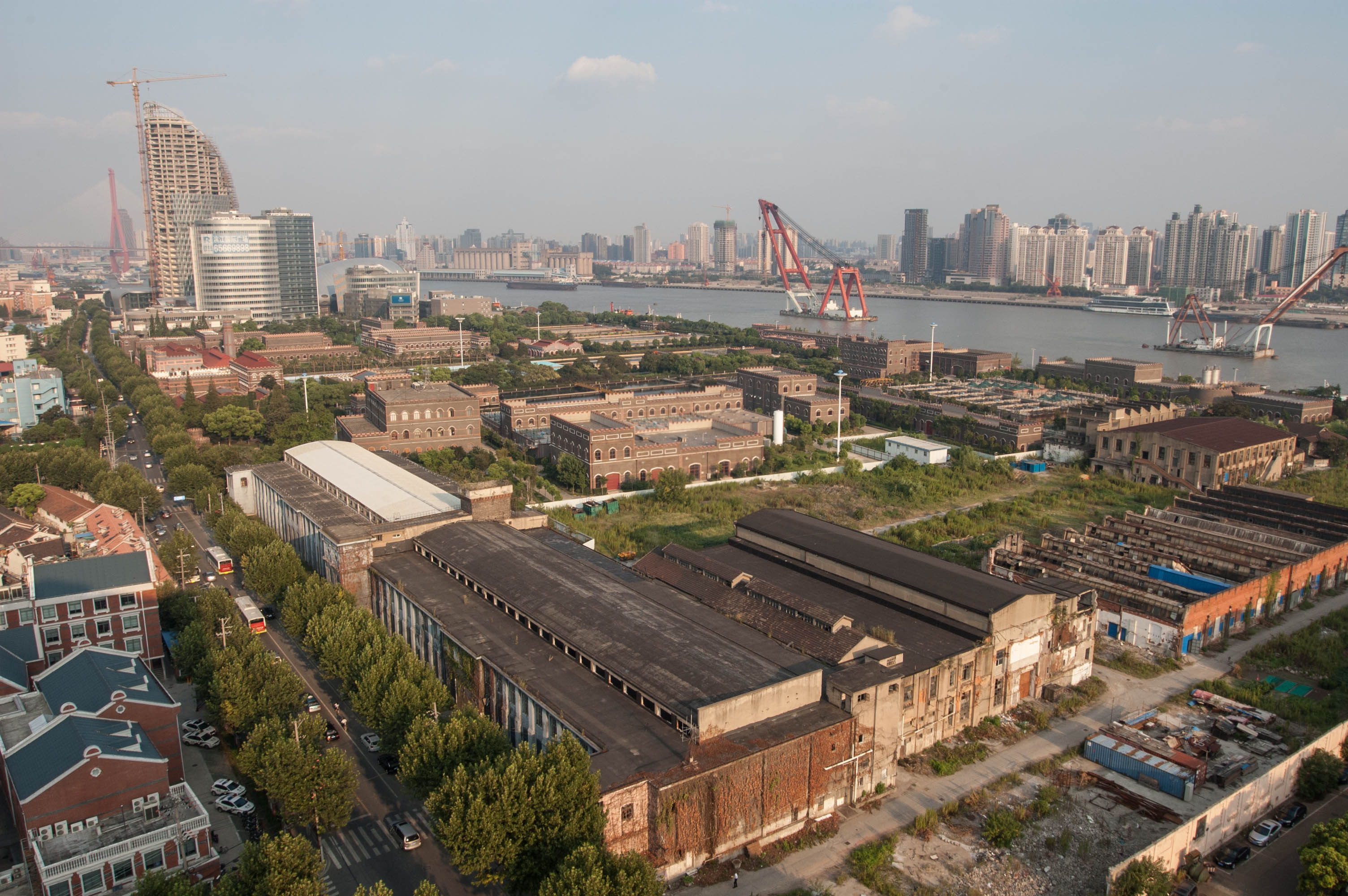 中文（中国大陆）: 杨树浦水厂